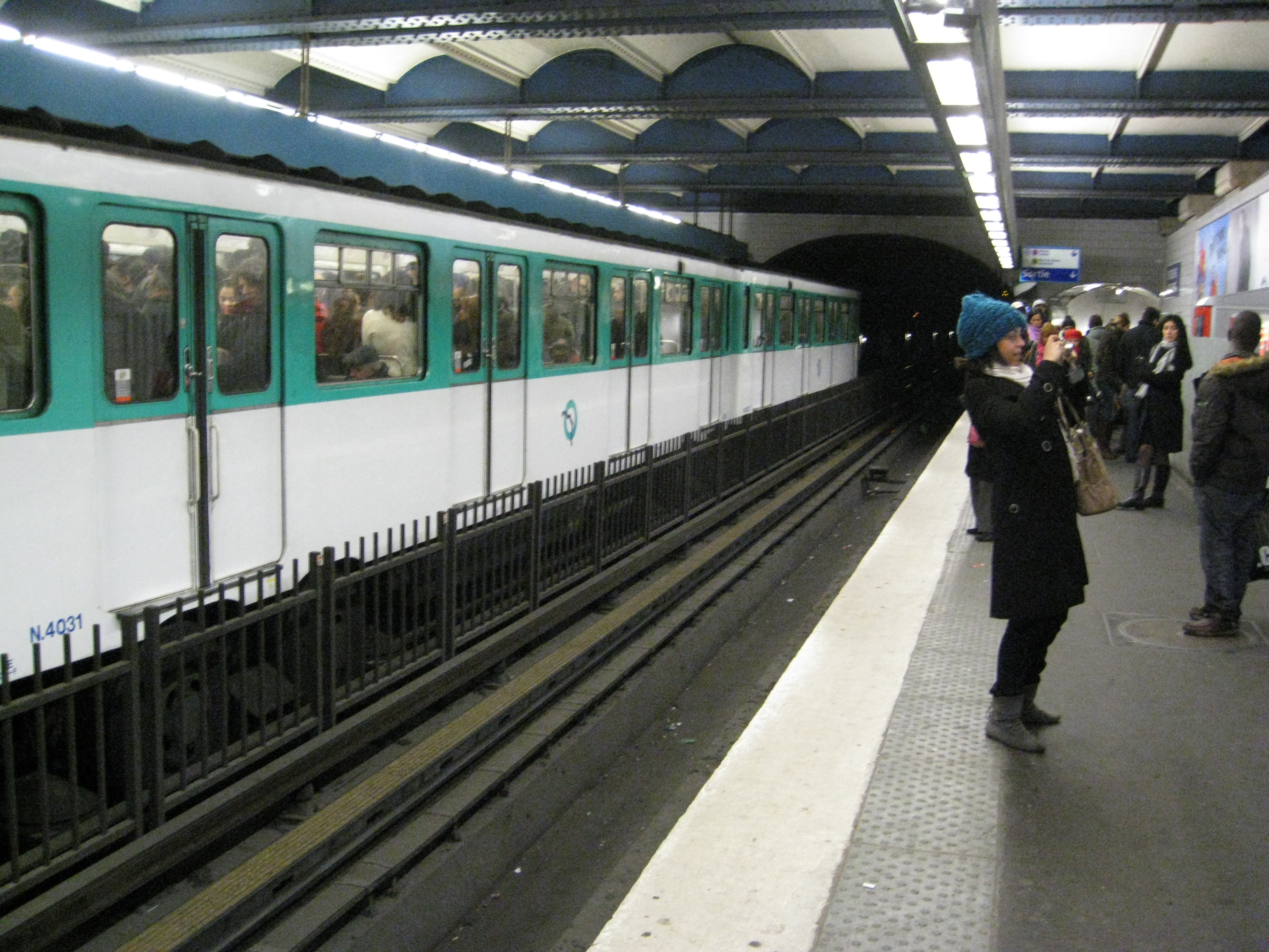 Strasbourg-Saint-Denis, ligne 4 du métro de Paris, France